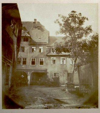 Rosenapotheke in Heilbronn, Geburtshaus Robert Mayers